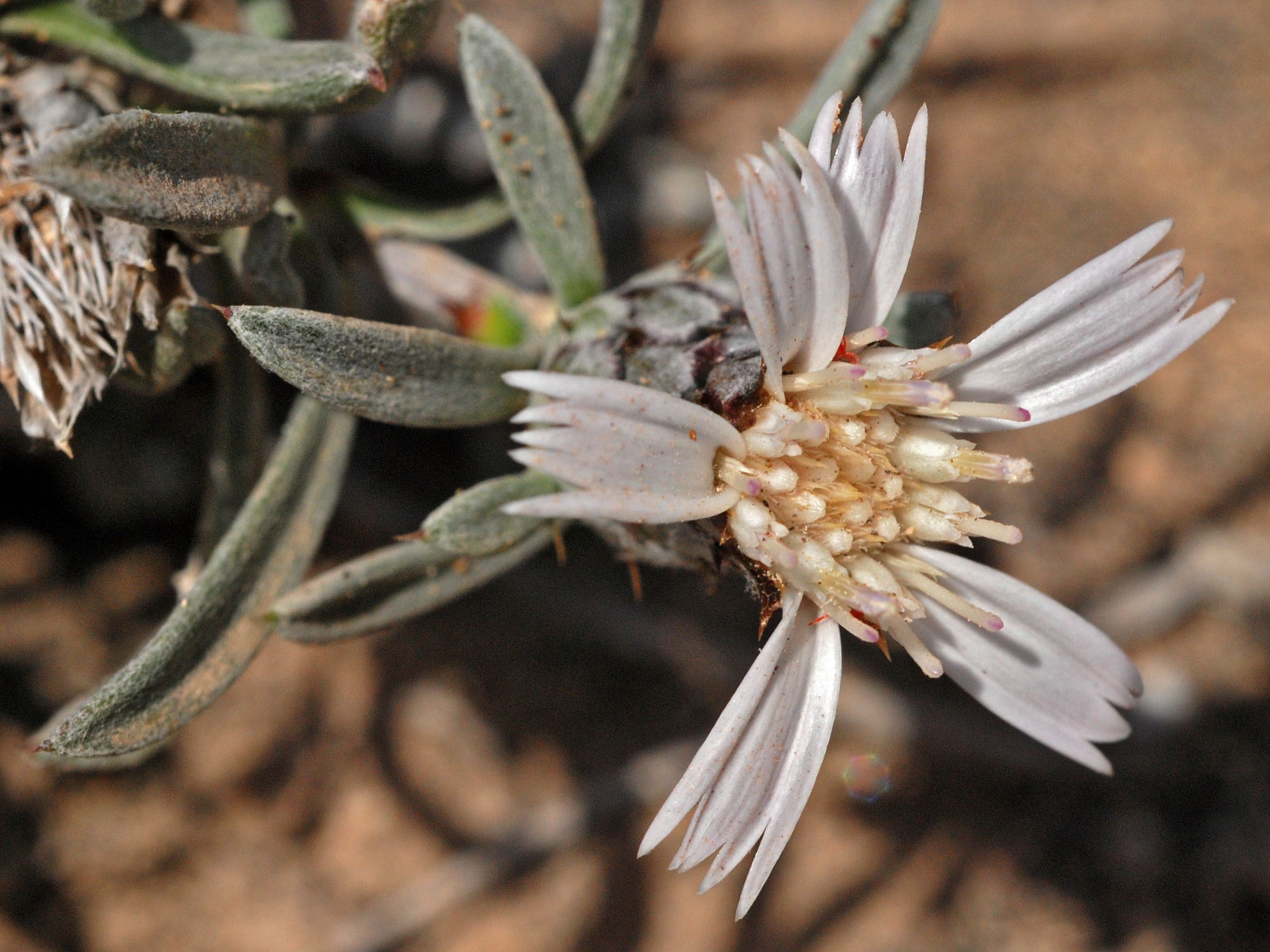 Atractylis preauxiana - Capitulo - Punta Arinaga, Isla de Gran Canaria (España).